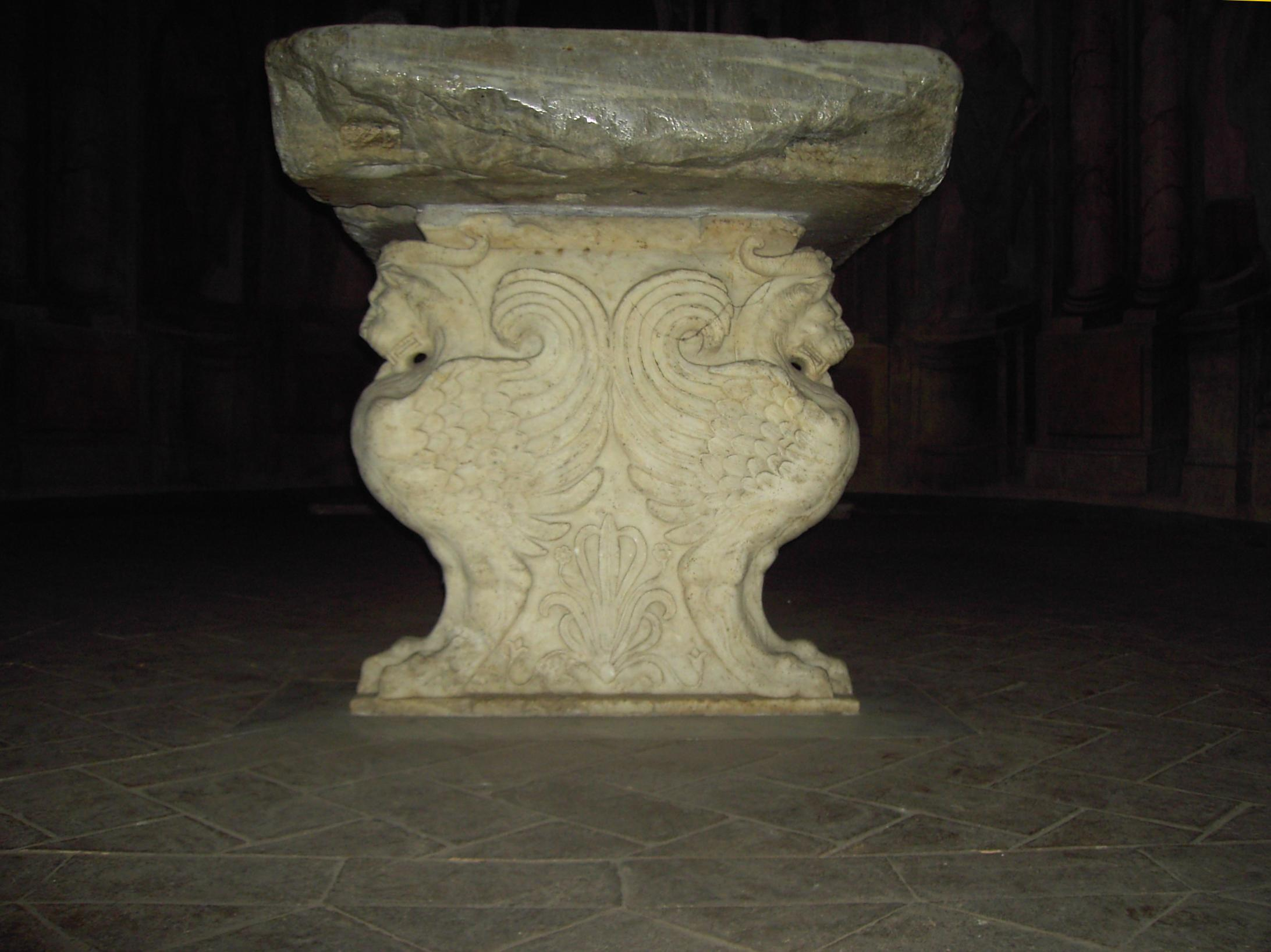 Roma, san Gregorio al Celio, oratorio di Santa Barbara: la Mensa pauperum